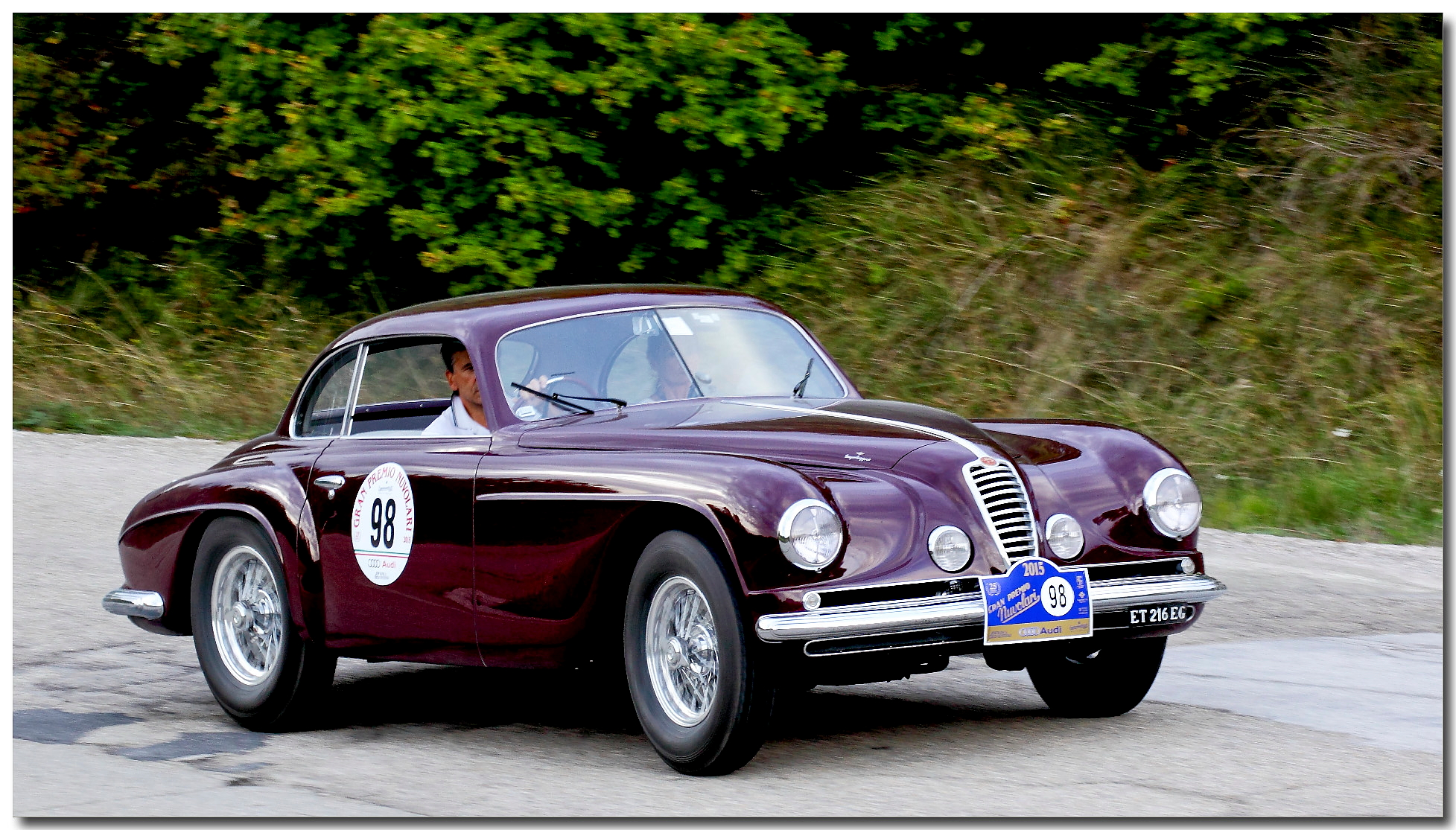 1951 Alfa Romeo 6C 2500 SS Villa d'Este Touring